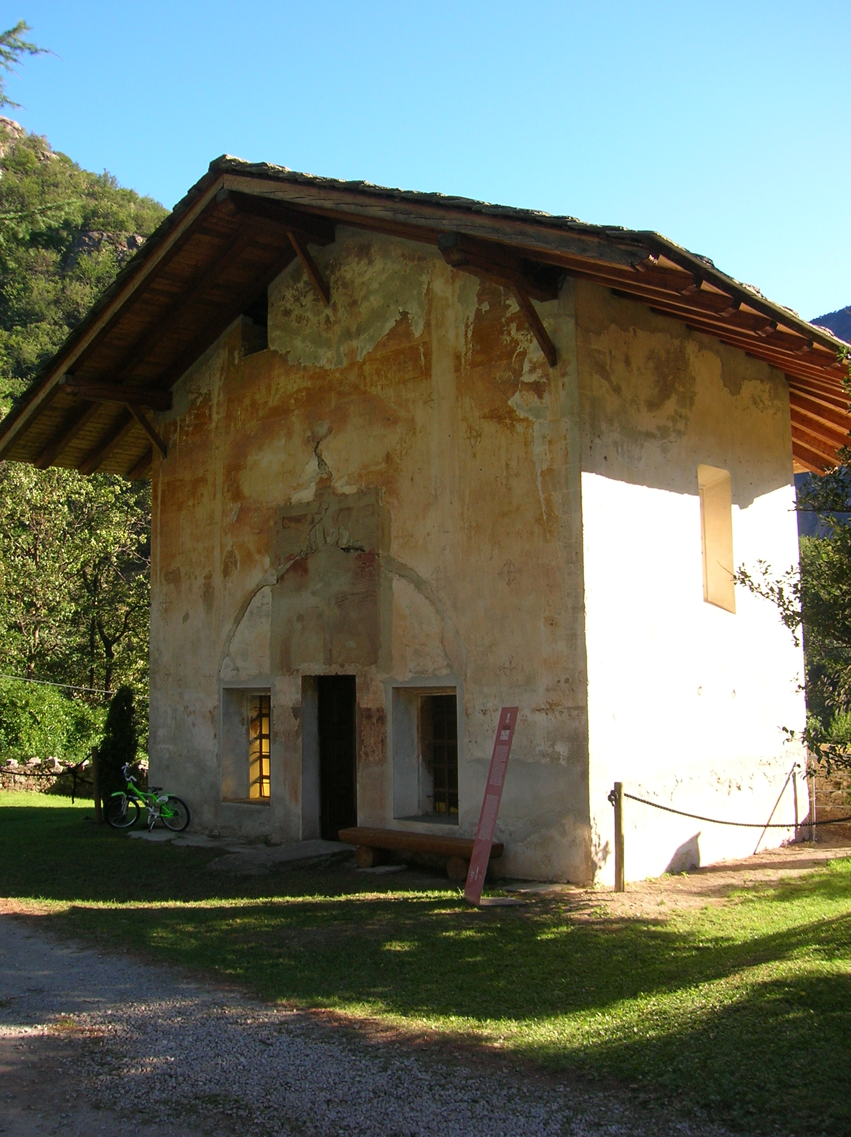 Esterno della cappella di San Giuseppe, Castello Vallaise Arnad, Valle d'Aosta, Italia.